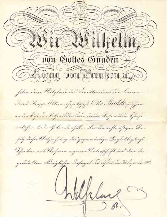 Verleihungsurkunde des Roten-Adler-Ordens an Otto Budde